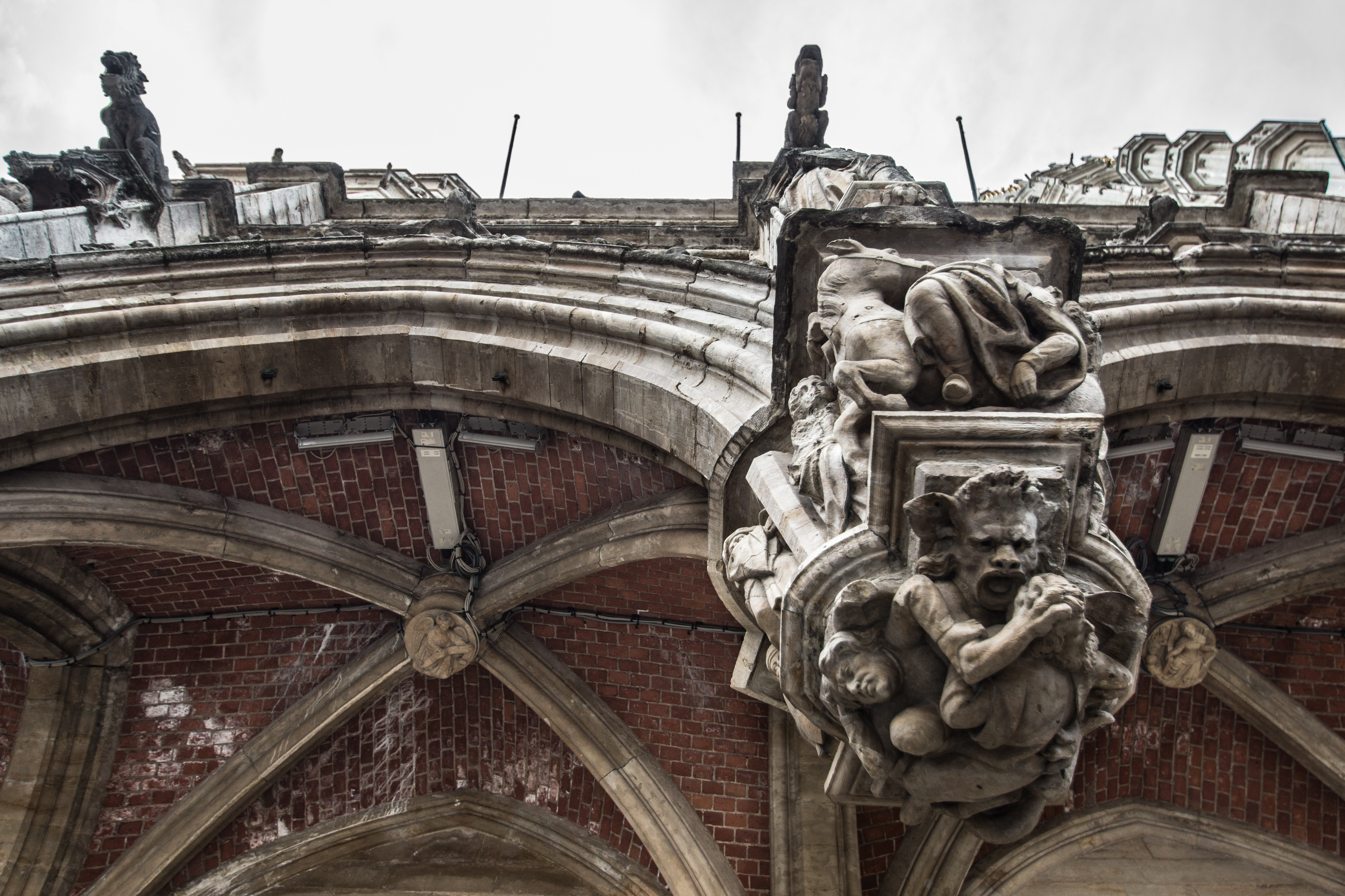 Stadhuis - Detalle